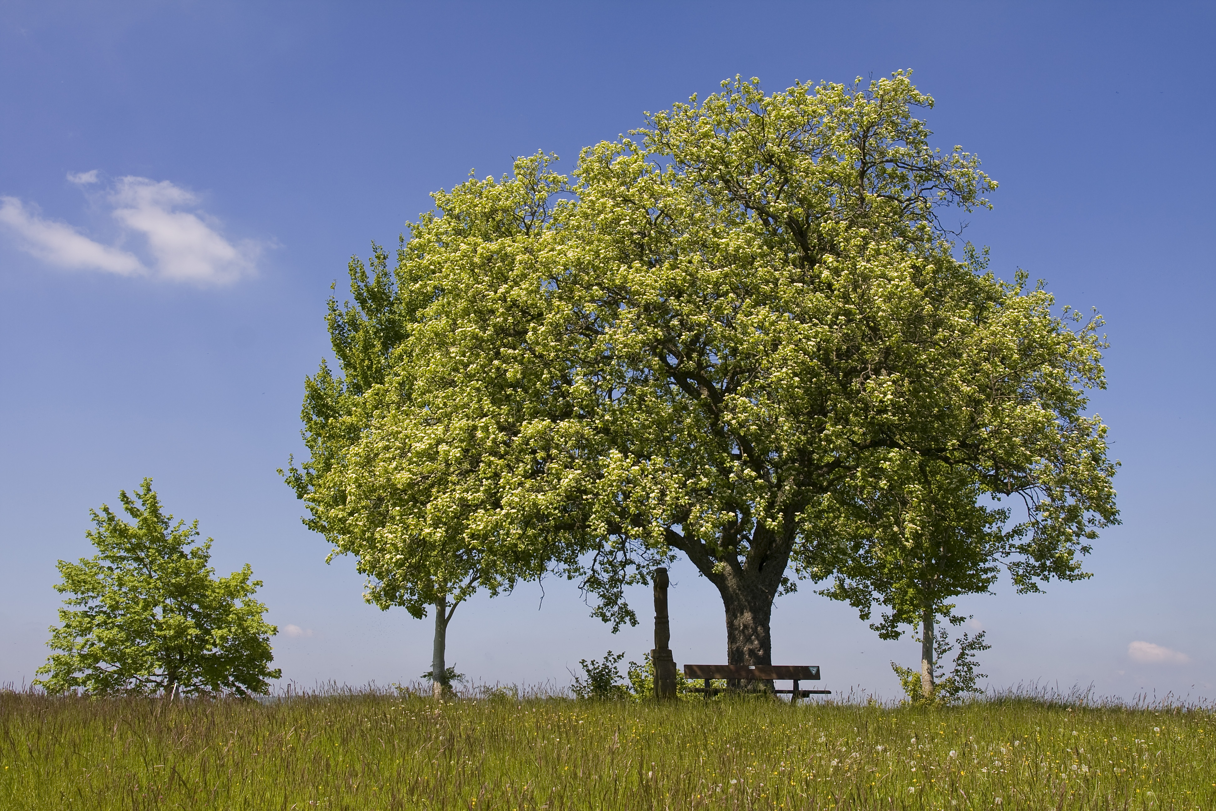 Naturdenkmal: Freistehende Elsbeere (Sorbus torminalis) bei Ripsdorf/Eifel (östlicher Ortseingang) im Naturpark Hohes Venn (Nordeifel)